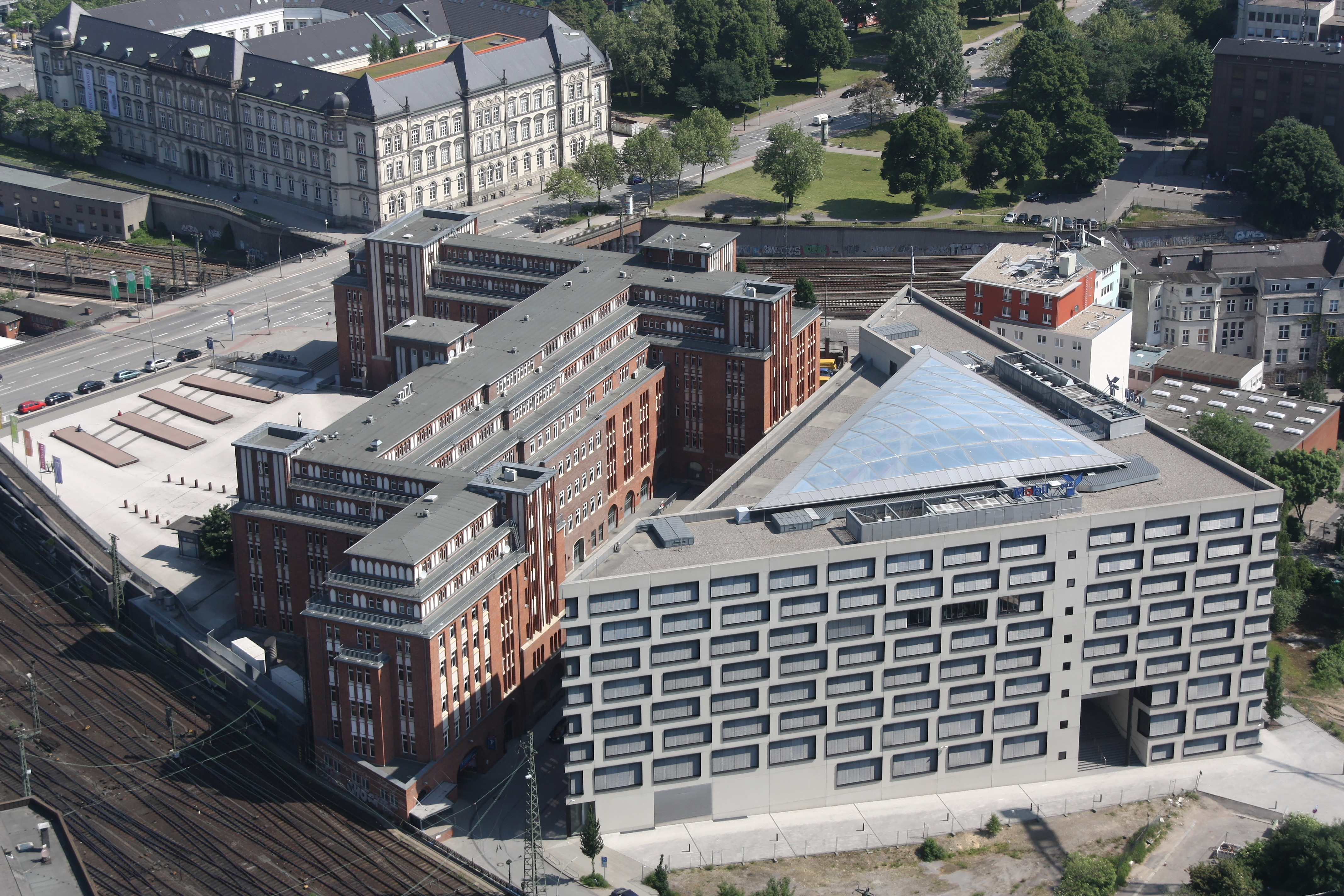 Hamburg, Blick aus dem Fesselballon Highflyer, links: Hühnerposten; rechts: Verwaltungsgebäude der Betriebskrankenkasse Mobil Oil